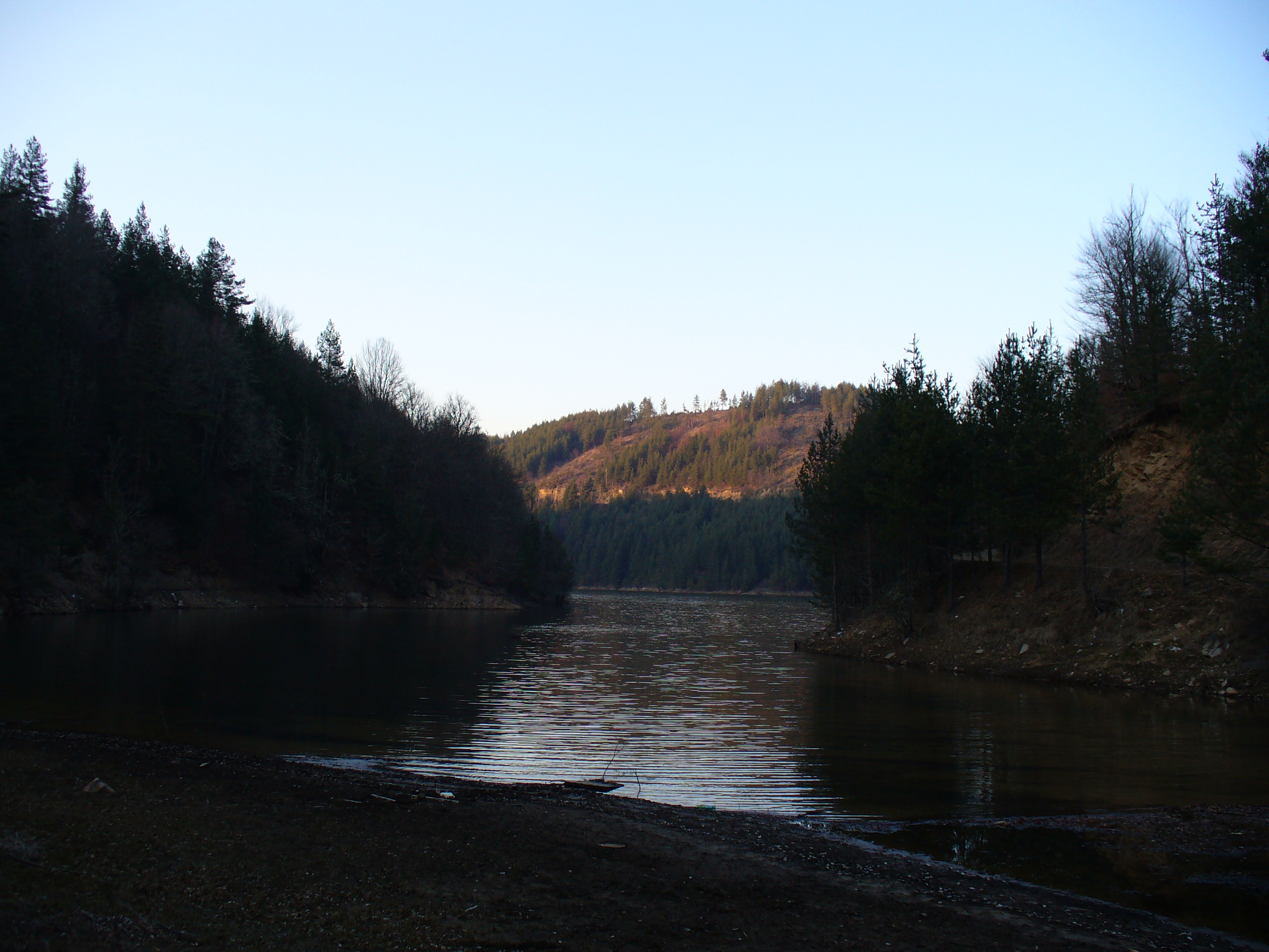 Berovo Lake, Macedonia